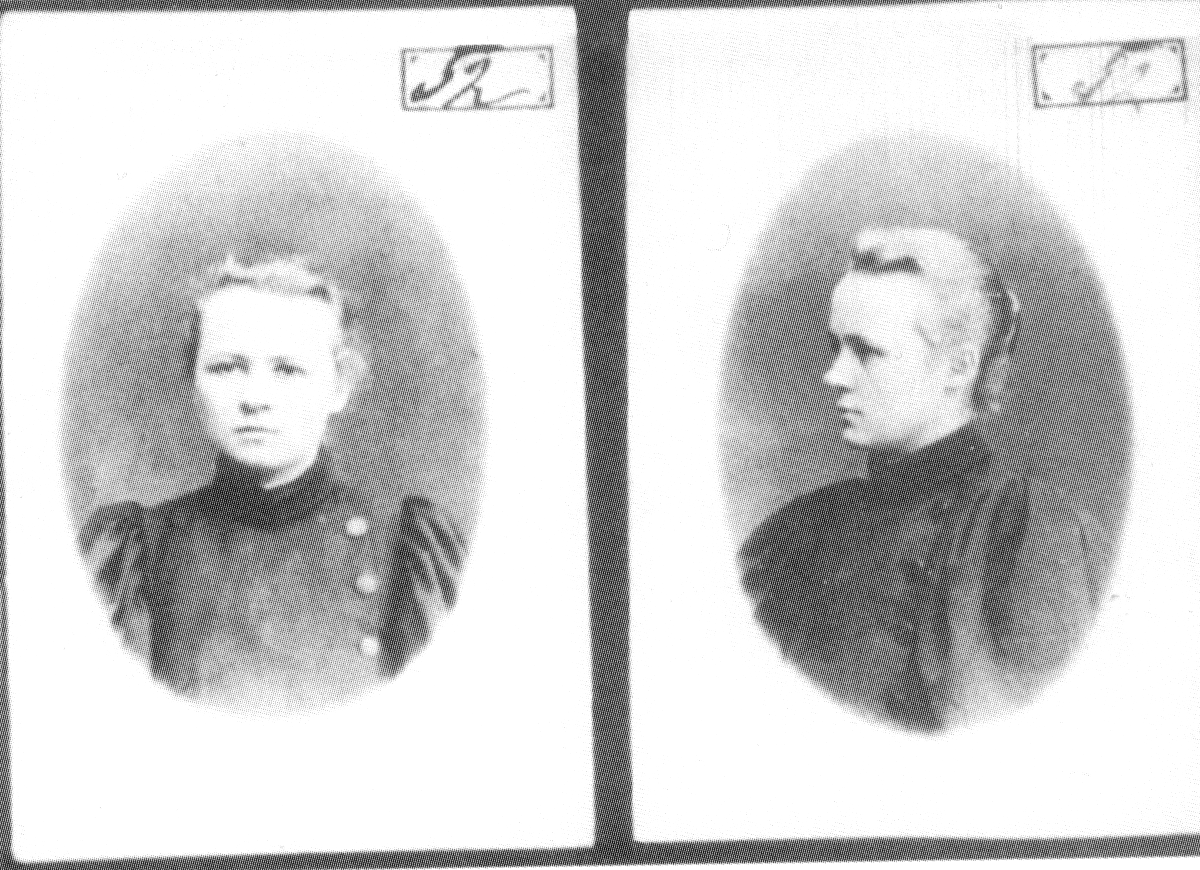 Фото секретной сотрудницы Московского охранного отделения Зинаиды Жученко-Гернгросс.